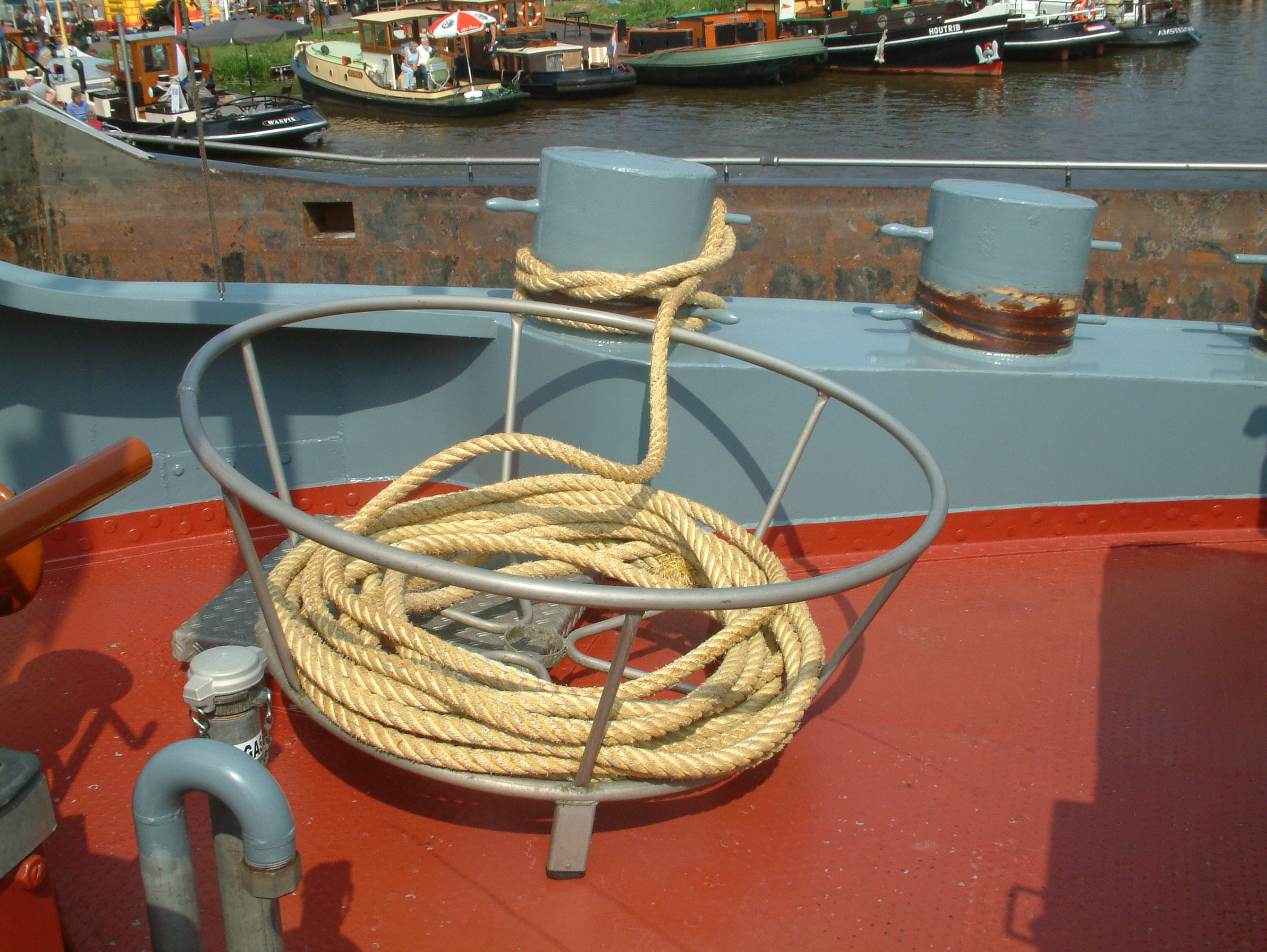 Draadmand op het voordek van een binnenschip. De functie is het voorkomen van kinken bij het uitvieren van het touw.